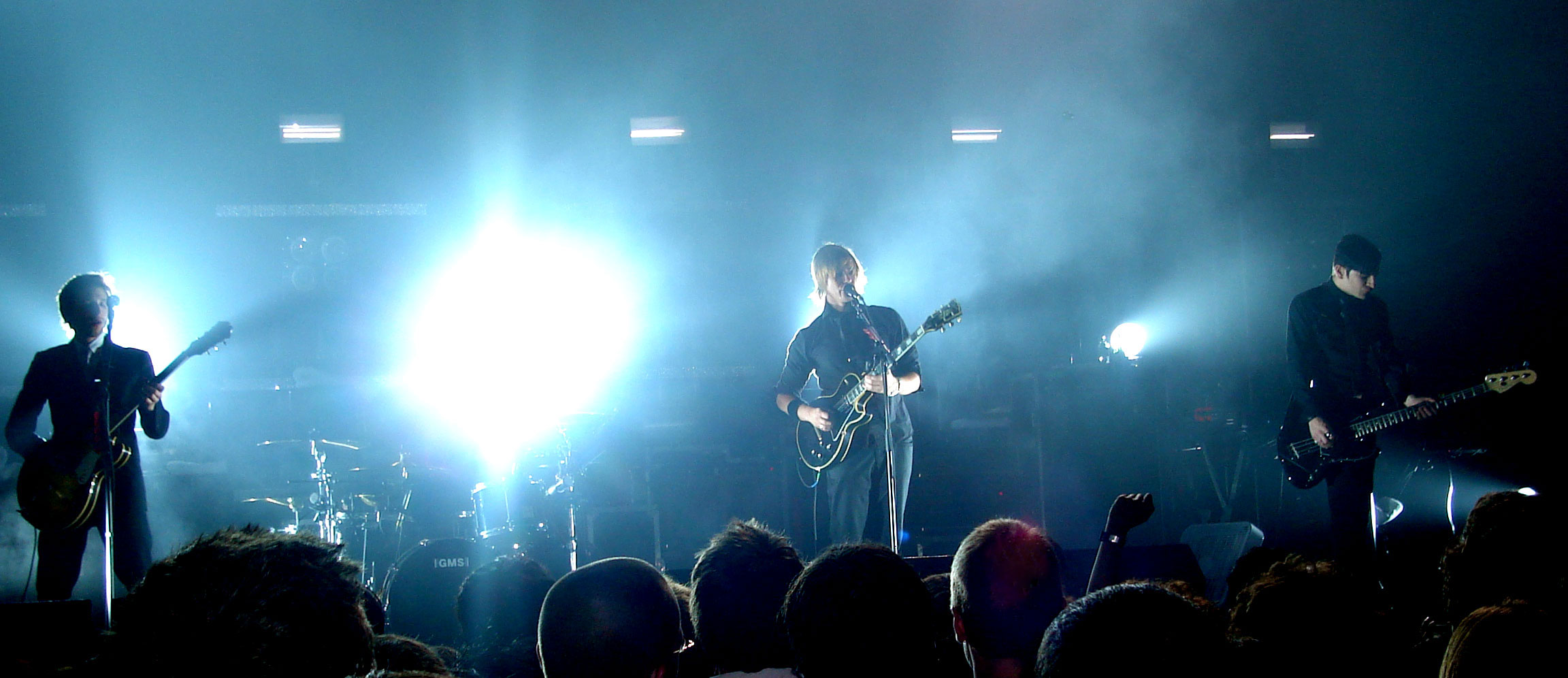 Interpol en concert au Métropolis de Montréal, lors du festival Pop Montréal, le 29 septembre 2005.